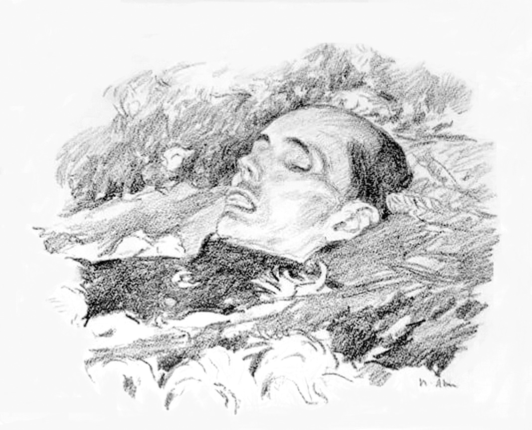 Пётр Львов. Посмертный портрет Николая Островского